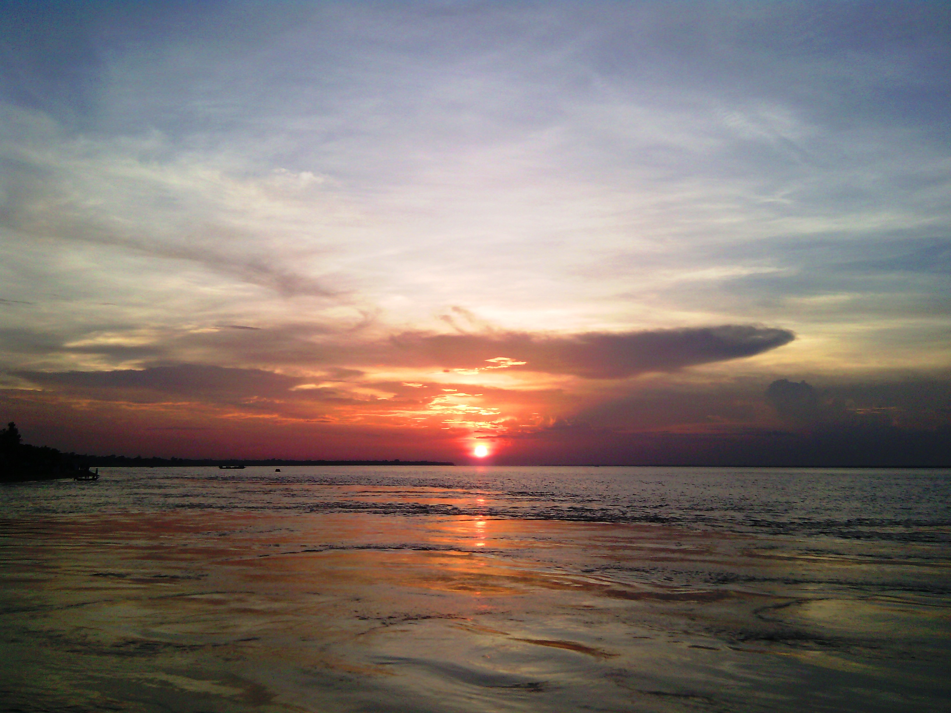 রাজবাড়ী শহরের পাশ দিয়ে প্রবাহমান পদ্মার বুকে রক্তিম সূর্যাস্ত। ফটোগ্রাফঃ তন্ময় দত্ত